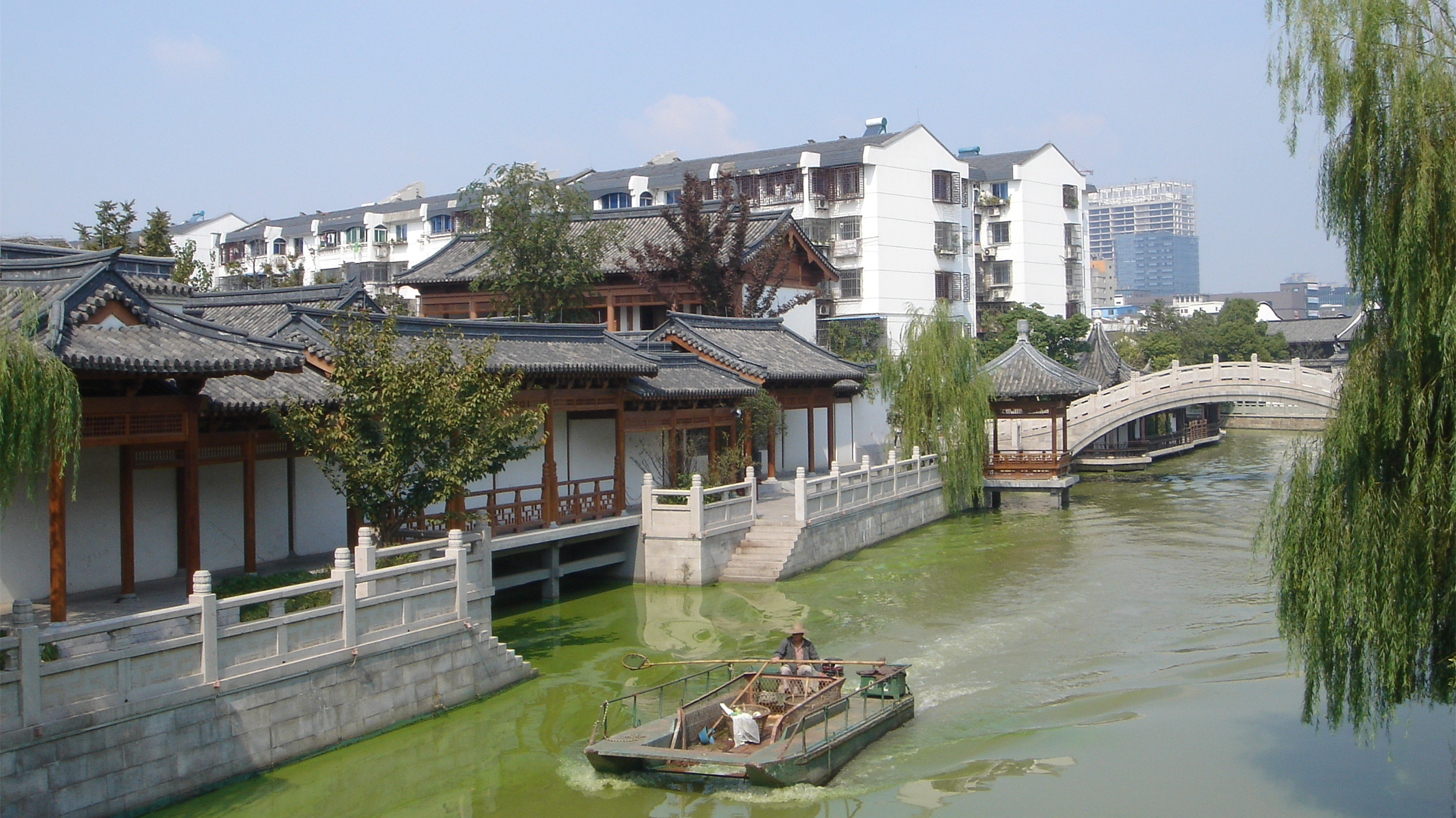 趙孟頫故居（改造後爲“趙孟頫故居舊址紀念館”，照片自月河橋上由東向西拍攝）